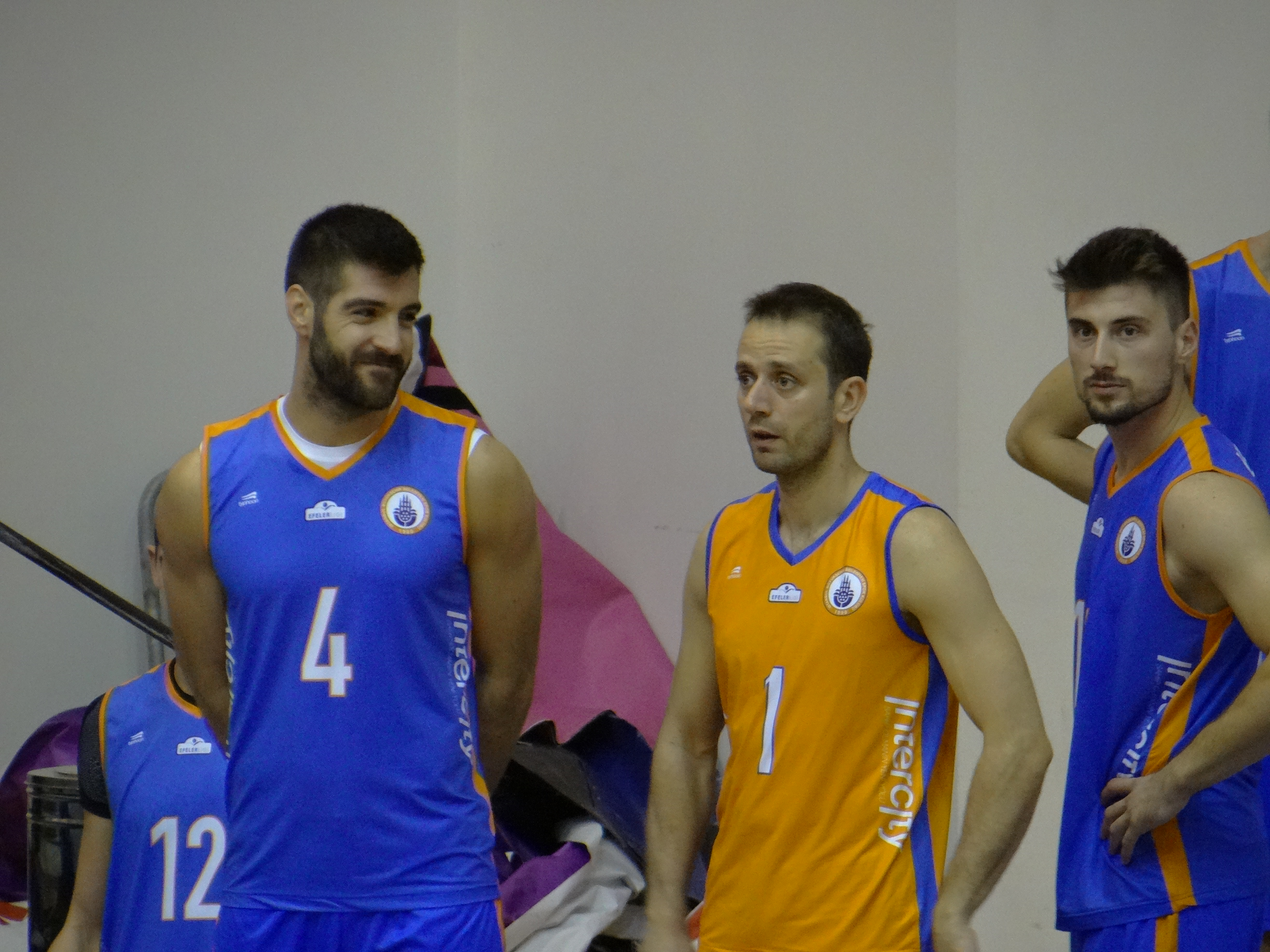 Murat Yenipazar